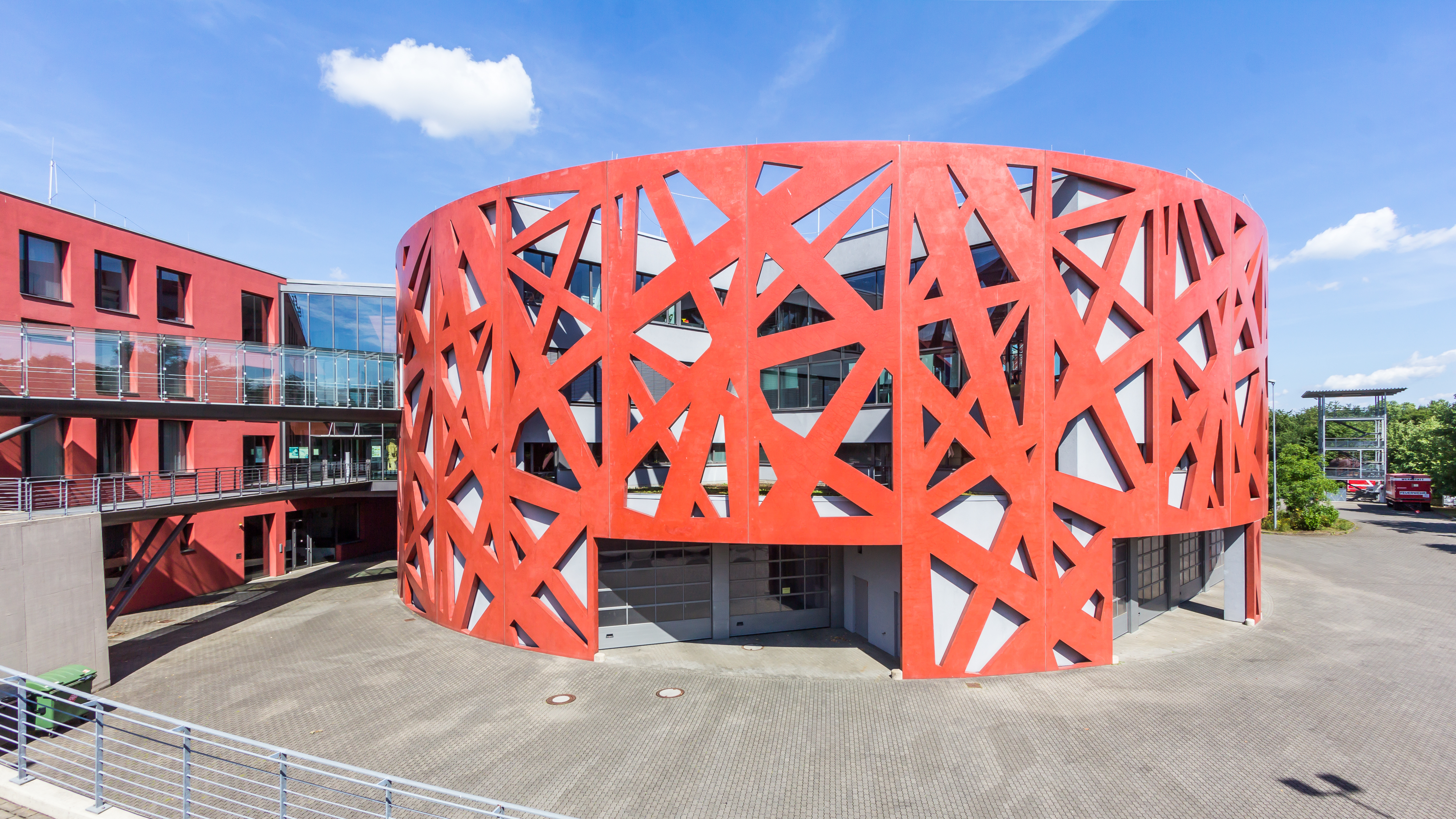 Führungs- und Schulungszentrum der Berufsfeuerwehr in Köln, Feuerwache Weidenpesch, Köln. Architekt: BFM Architekten Partnerschaft (Stephan Böhm, Jürgen Flohre, Maria Mocanu). Baujahr: 2005